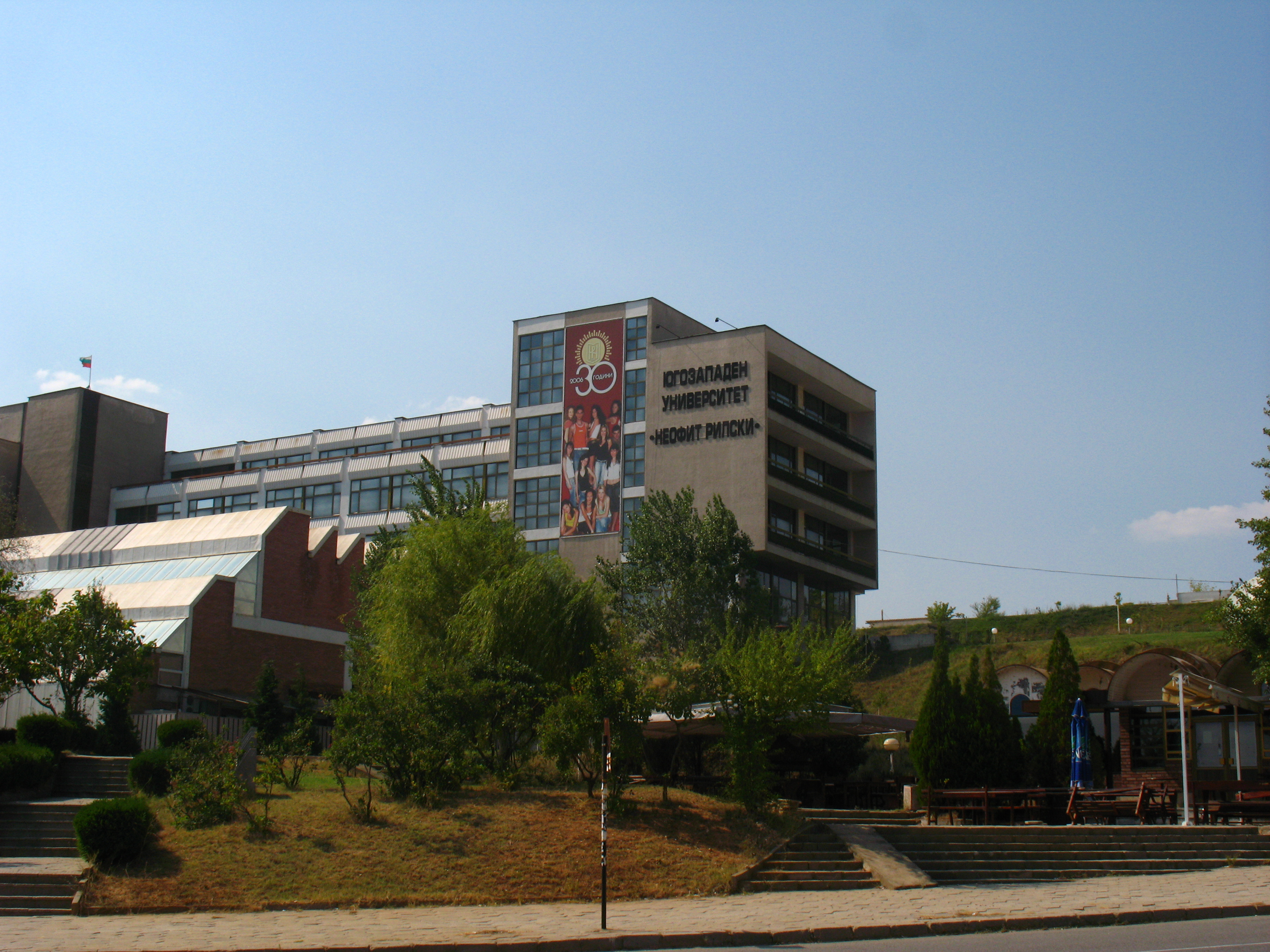 ЮЗУ „Неофит Рилски“, Благоевград, България